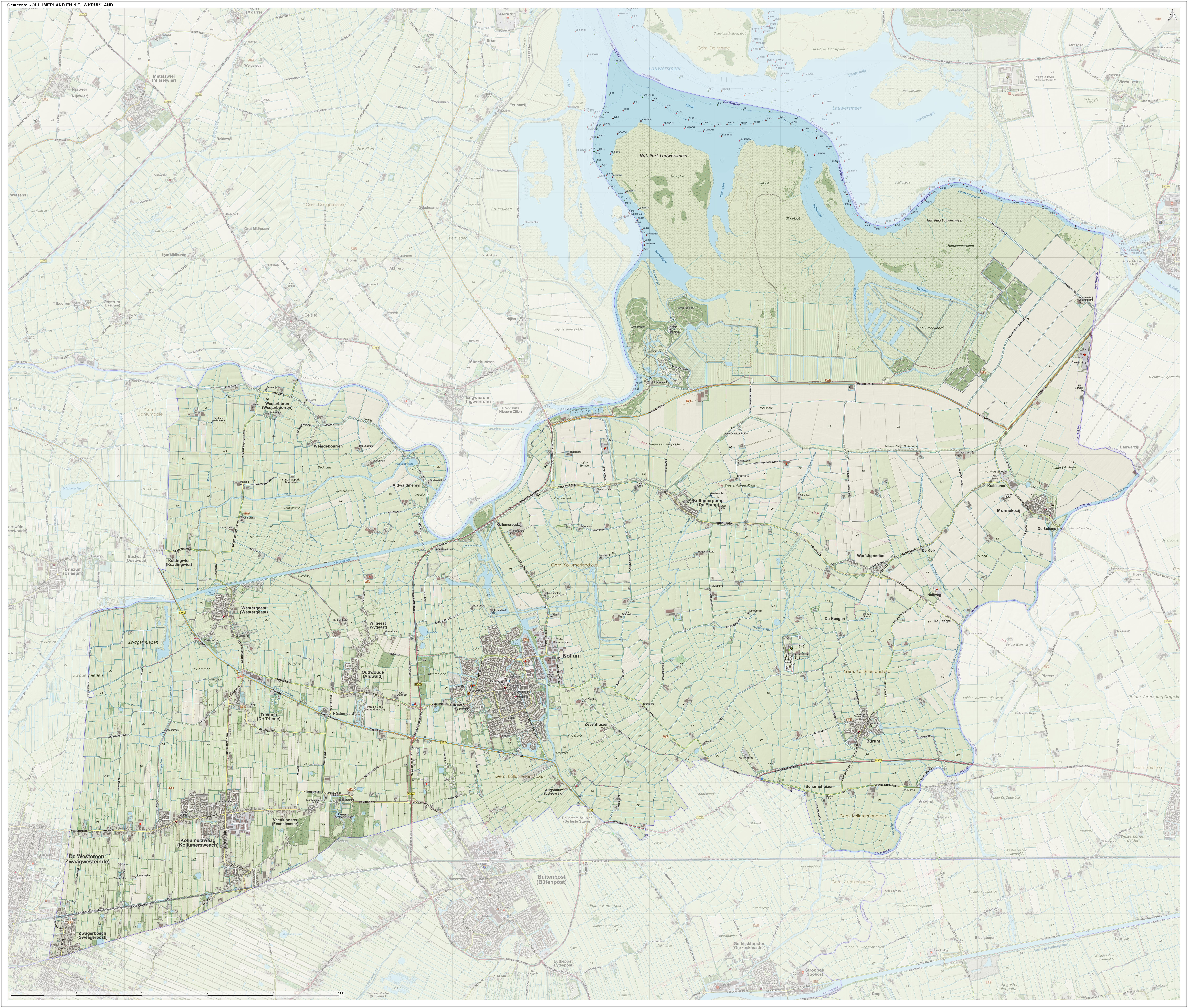 Topografische gemeentekaart. Resolutie: 400 pixels/km. Kaartbeeld samengesteld uit de open geodata van de Top10NL en Top25namen (Kadaster), Creative Commons-BY licentie. Gebouwvlakken uit open geodata BAG extract. Wegen uit de OpenStreetMap, OpenStreetMap community. Reliëfschaduw uit de Actuele Hoogtekaart AHN2. Samenstelling en kleurenschema: Jan-Willem van Aalst, met QGIS. Zie ook de Legenda.